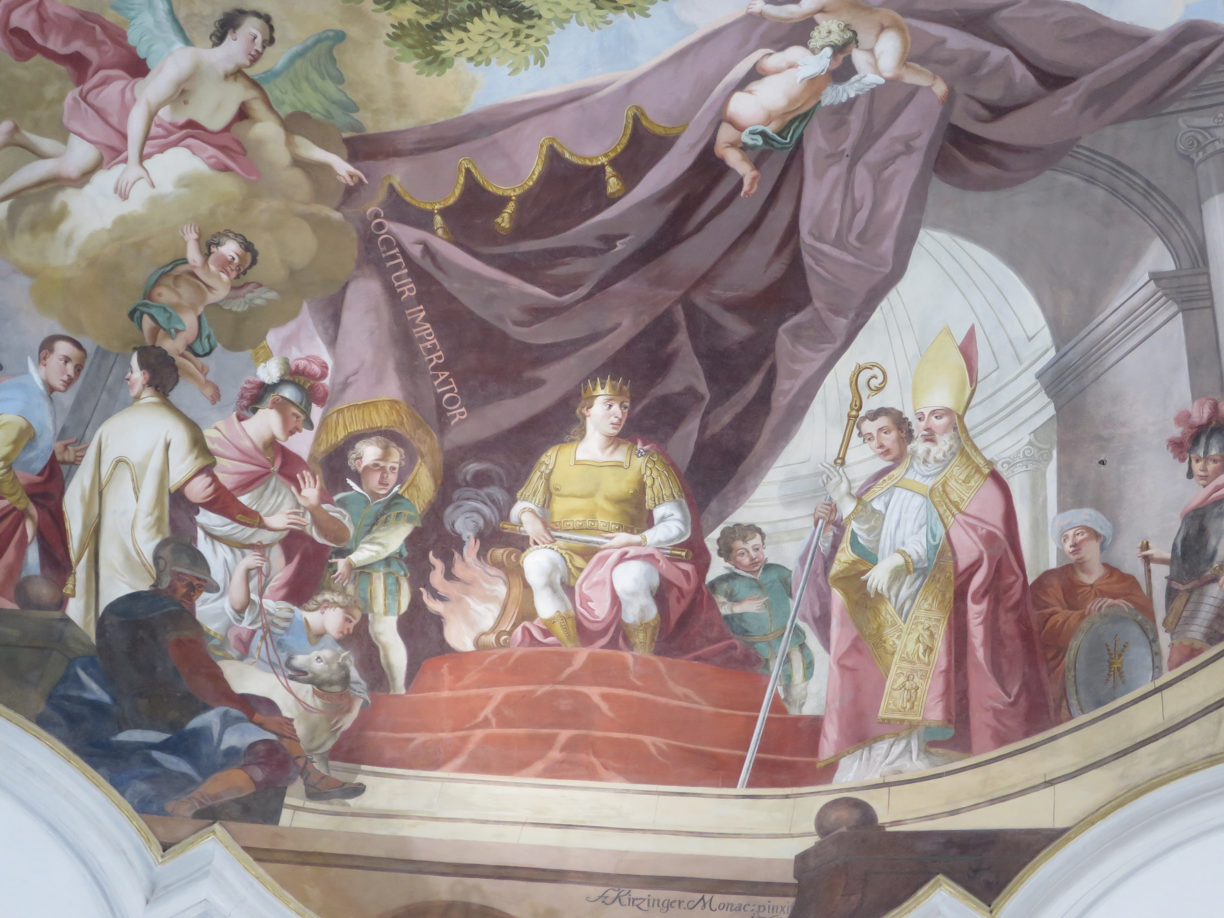 Detail des Langhausfreskos von Fr.S. Kirzinger 1764ː der Heilige Martin steht vor Kaiser Valentinian in Trier.